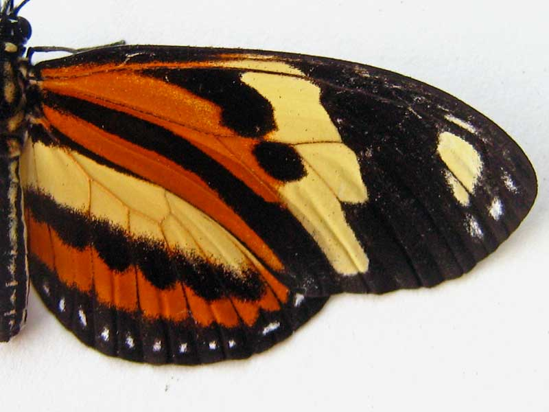 Eueides isabella dianassa